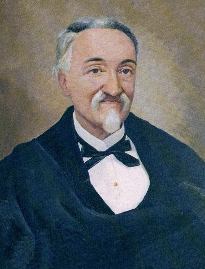 Cuadro de la Galería del Museo Municipal de Guayaquil